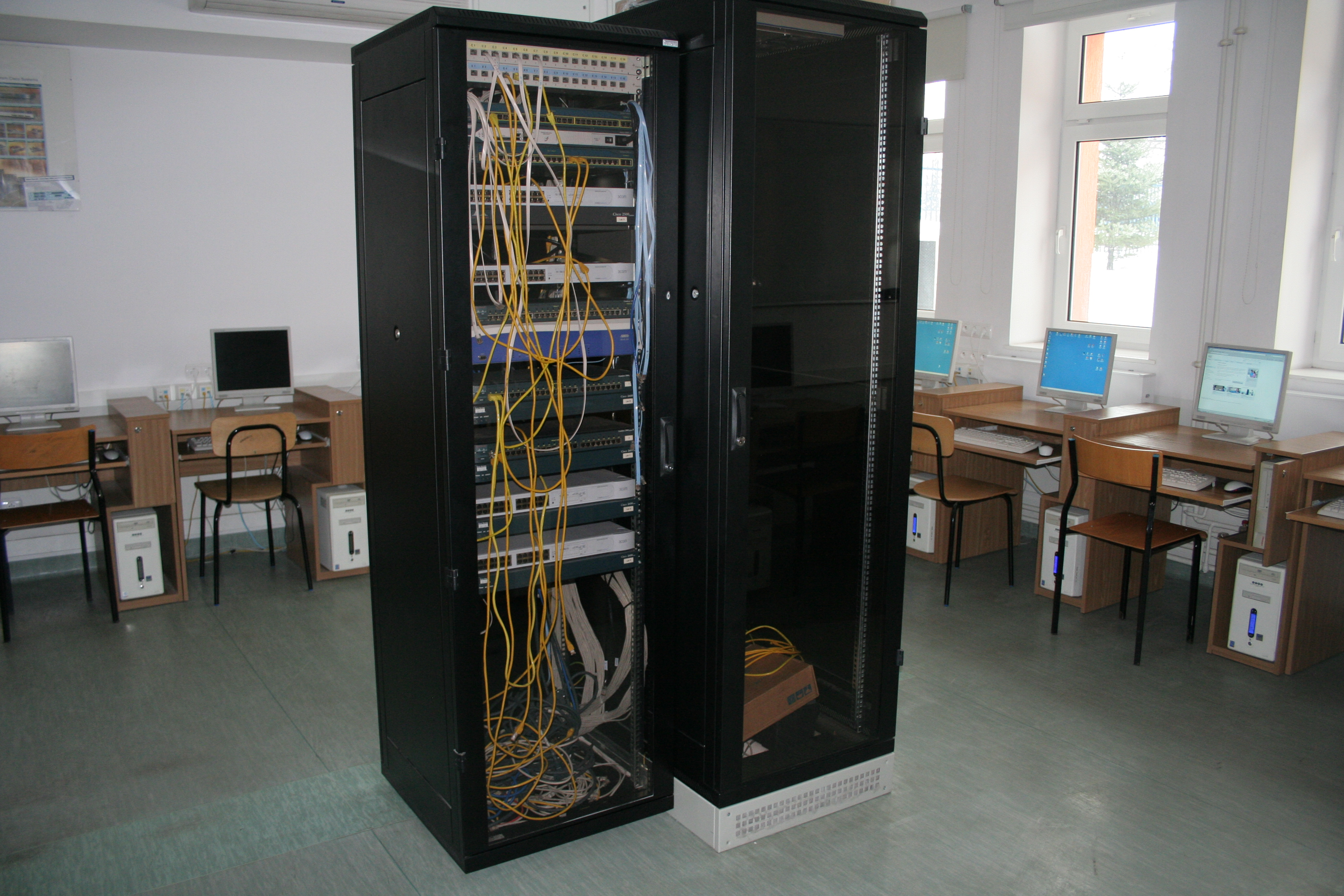 WSPA Lublin - pracownia CISCO